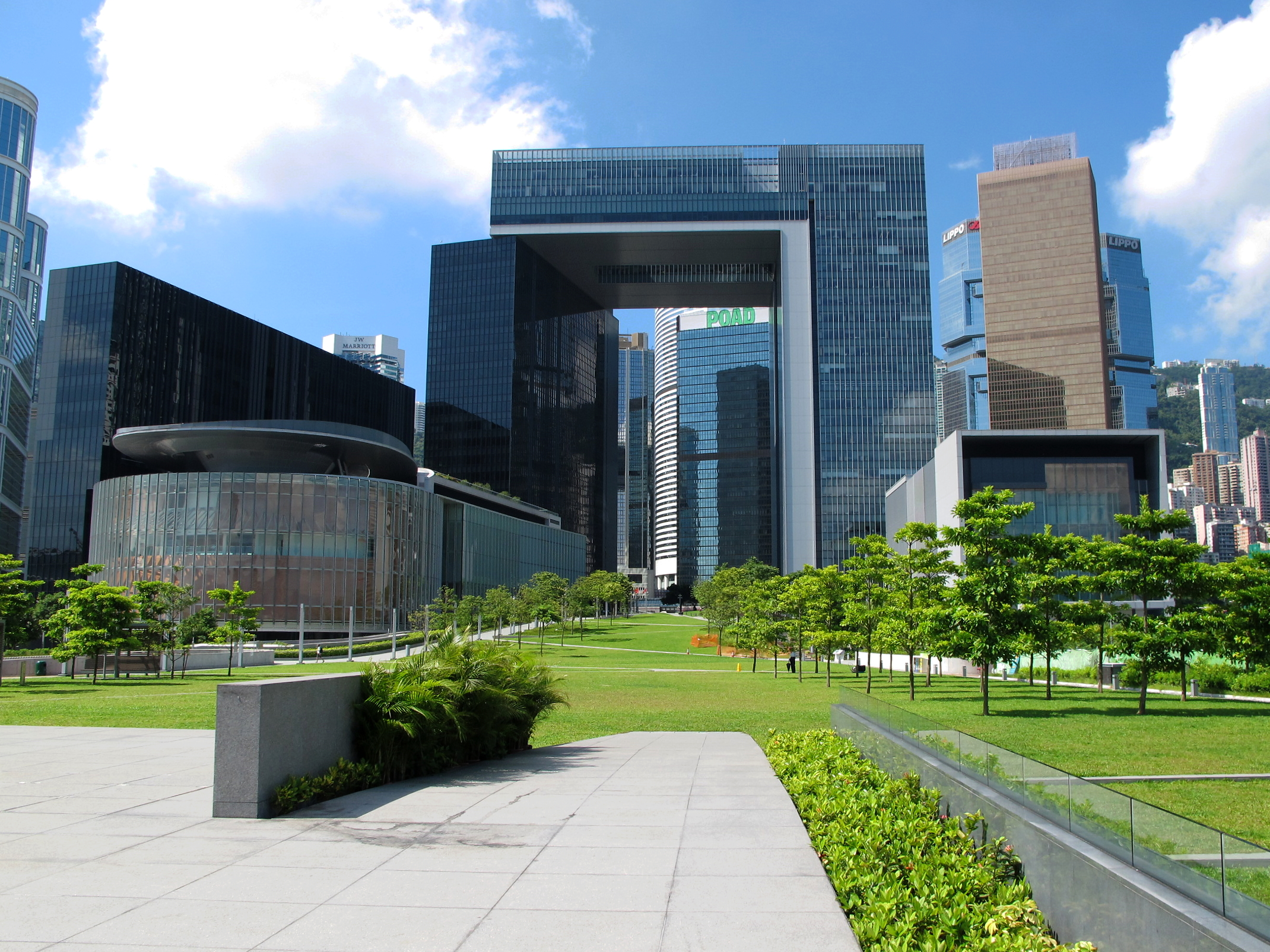 Tamar Development 添馬艦發展工程